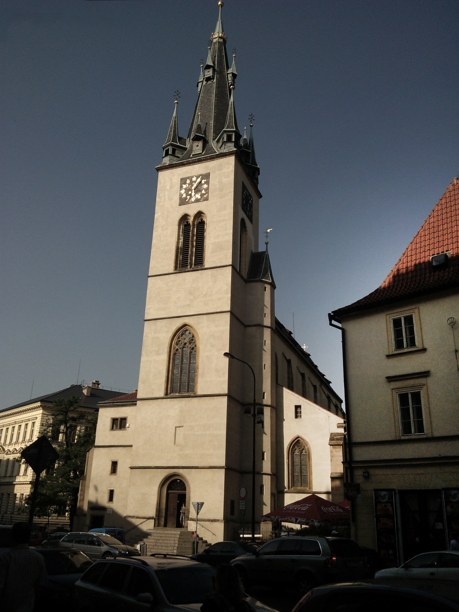 Kostel svatého Štěpána, Praha Nové Město